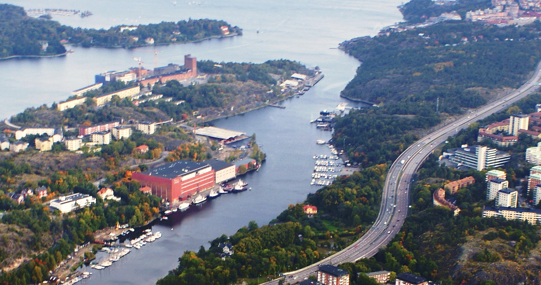 Kvarnholmen och Svindersviken